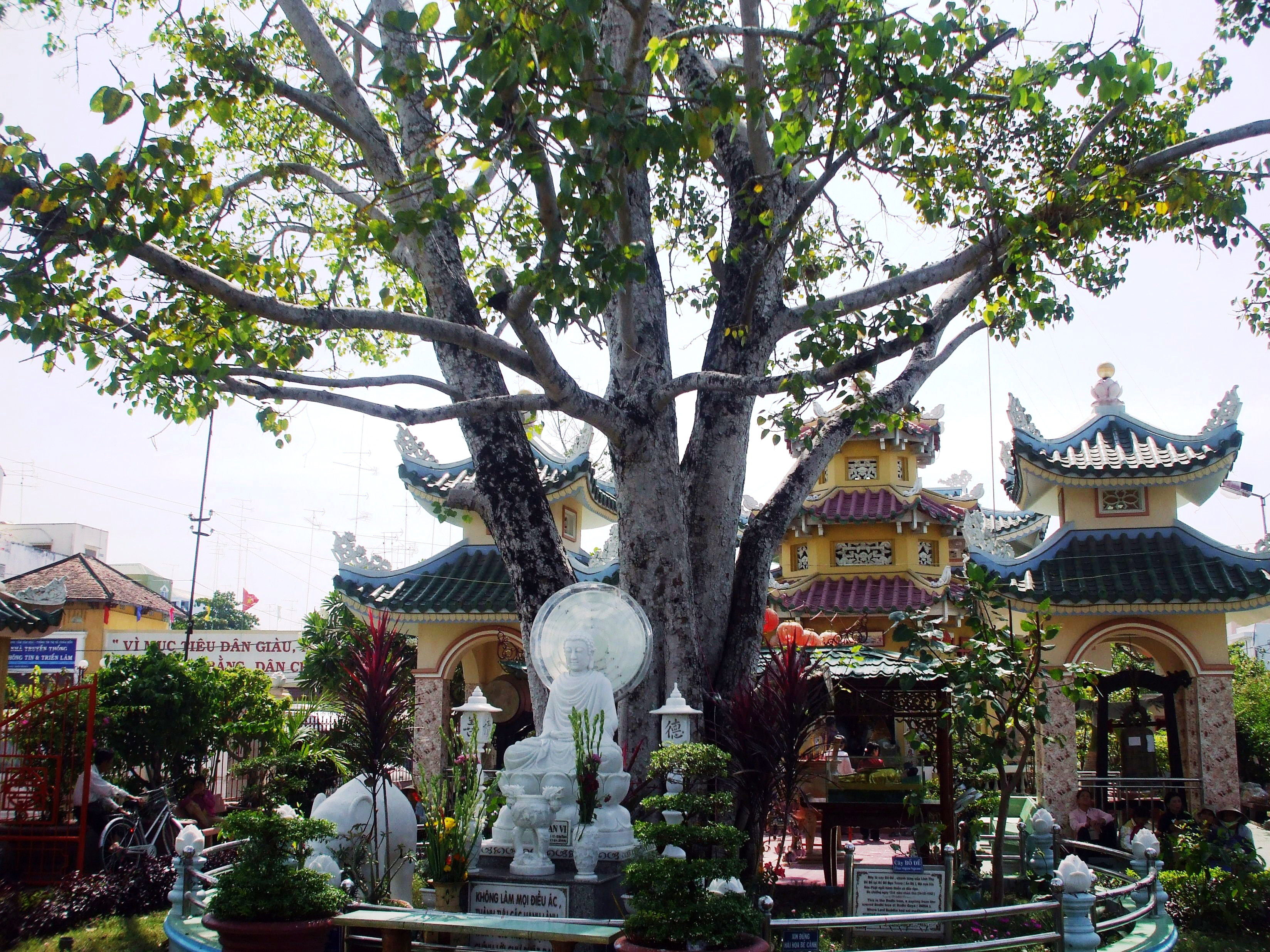 Tượng Phật Thích Ca ngồi bên gốc bồ đề trong khuôn viên Bồ Đề Đạo Tràng (Châu Đốc, An Giang, Việt Nam